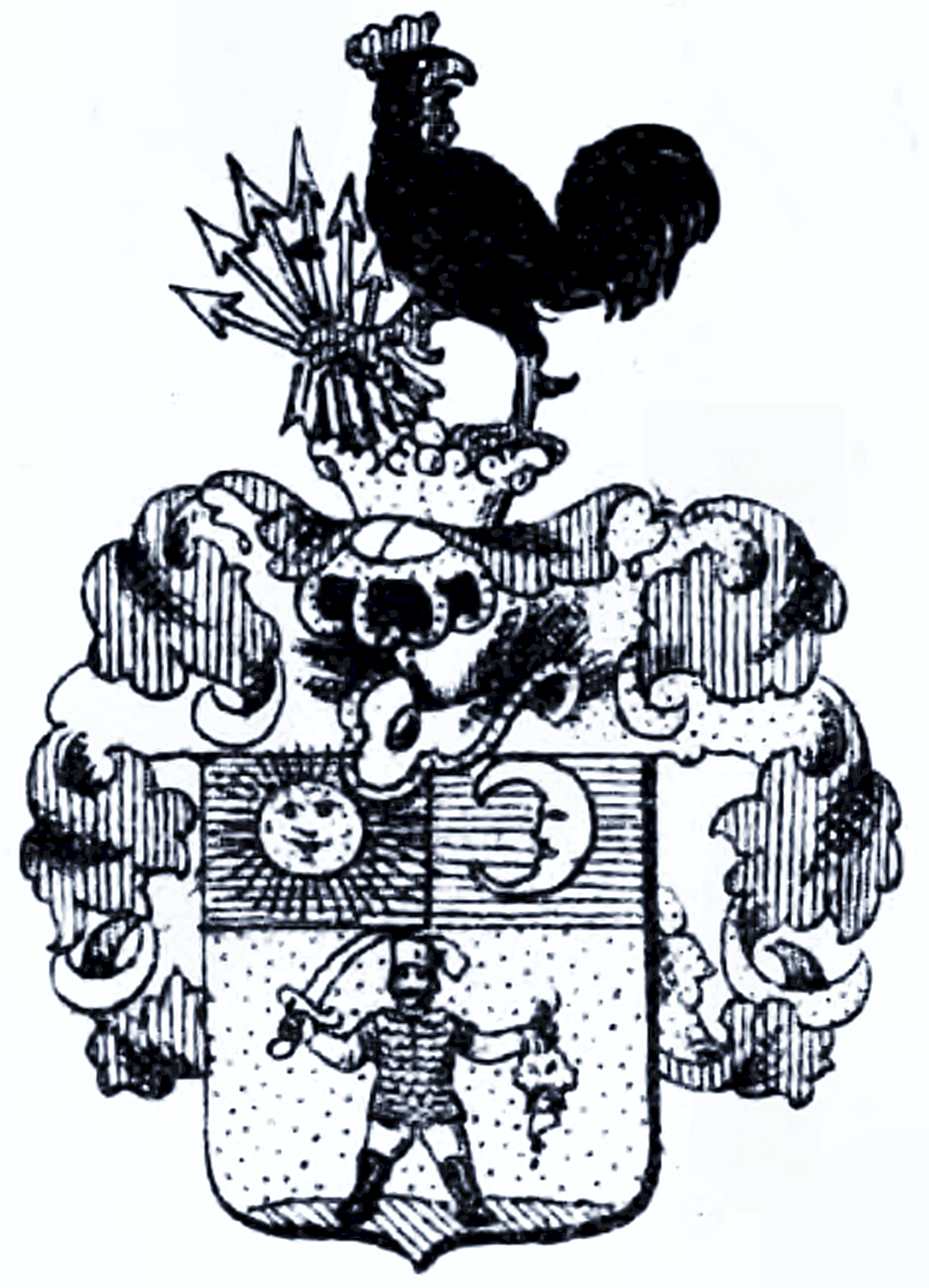 Wappen Dunca von Sajo